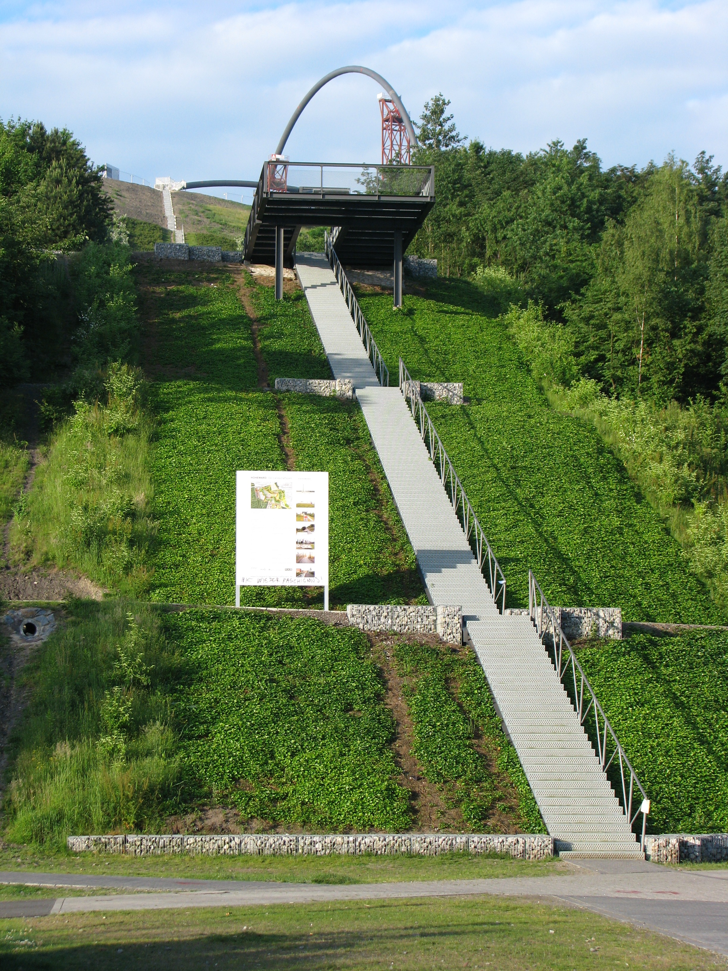 Himmelsstiege der Halde Hoheward vom Salentinplatz aus